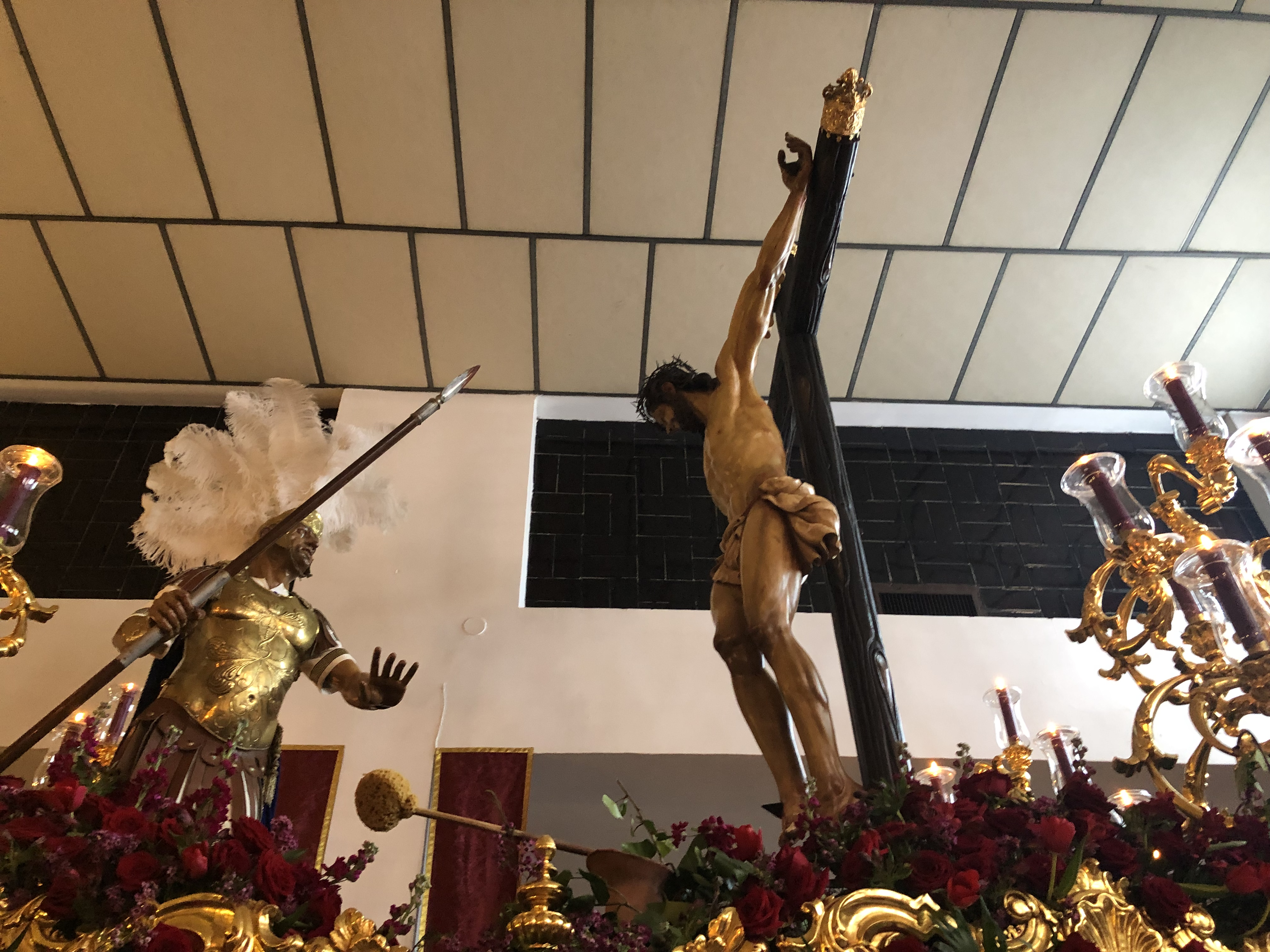 Cristo de la Lanzada